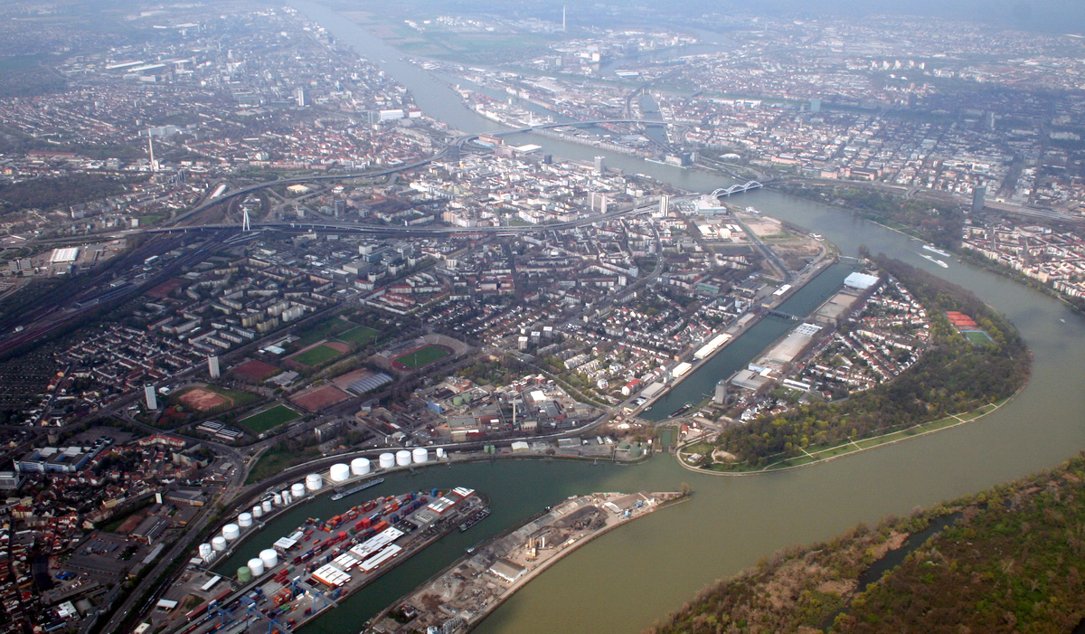 Blick auf Ludwigshafen am Rhein (Stadt) aus einem Segelflugzeug